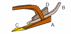 Dessin illustrant comment un reil peut être monté sur une araire chambige